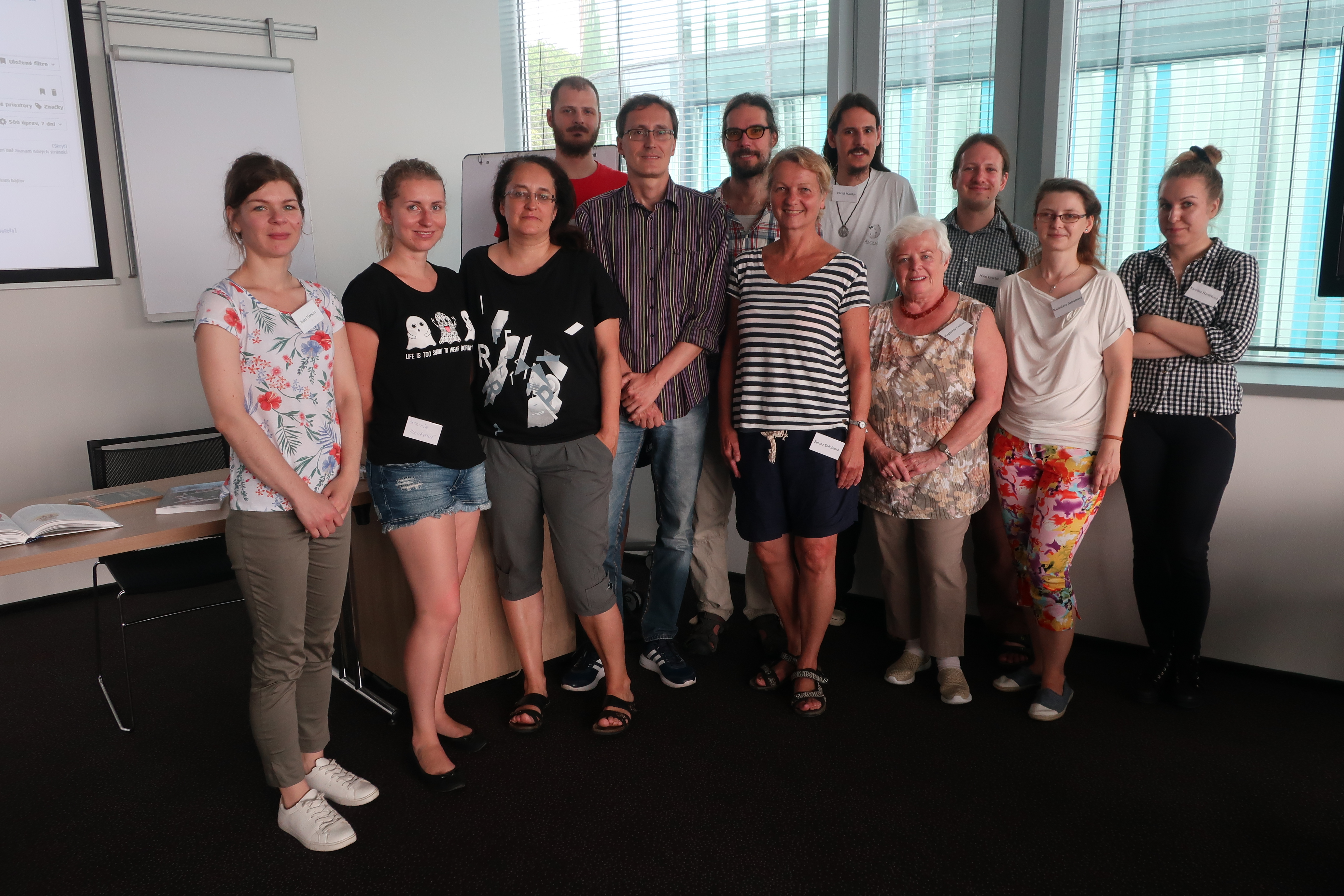 WikiEdit Slovenská ľudová kultúra jún 2018